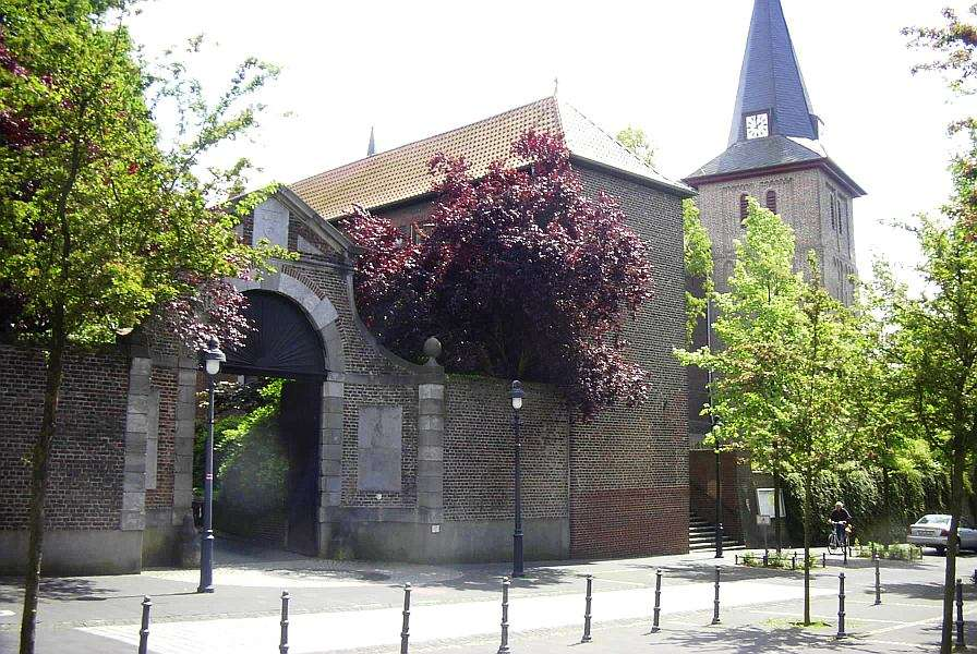 Kirche Peter und Paul, Wegberg.